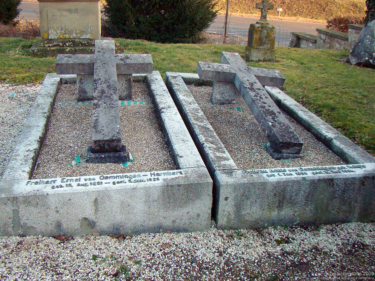 Gräber von FReiherr Ernst von Gemmingen-Hornberg (1851-1928) und seiner Gattin Annie in der Familiengrablege der Freiherren von Gemmingen in Bad Rappenau-Babstadt